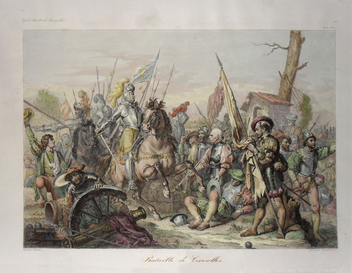 Bataille de Cérisoles